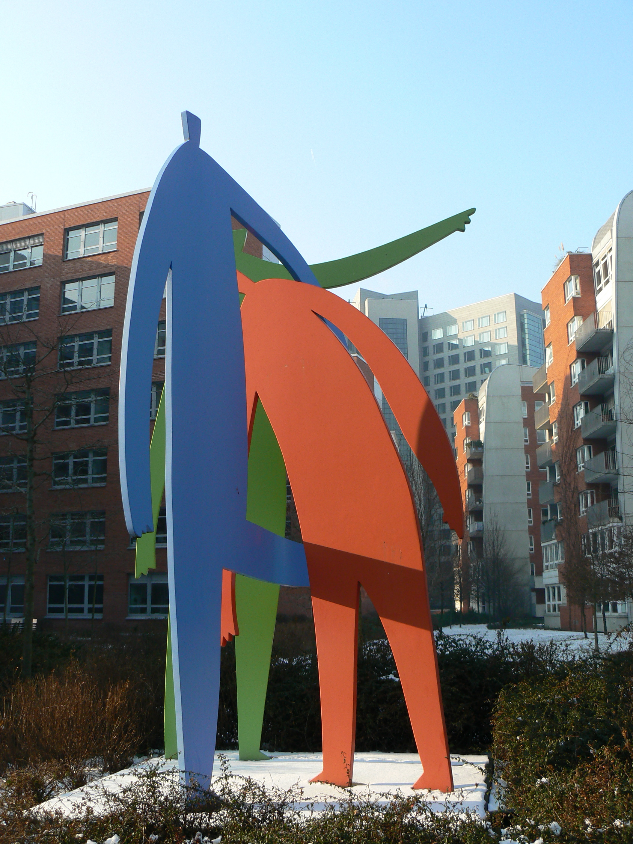 mehrfarbige Figurengruppe des Düssedorfer Künstler Klaus Richter (* 1955 Hof/Saale) aus Metall von 1998 vor Hochhausgruppe der Liegenschaft ABC West der DG-Immobiliengruppe, An der Dammheide, Ffm-Bockenheim, City-West